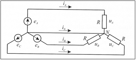 Kolmefaasiline ahel